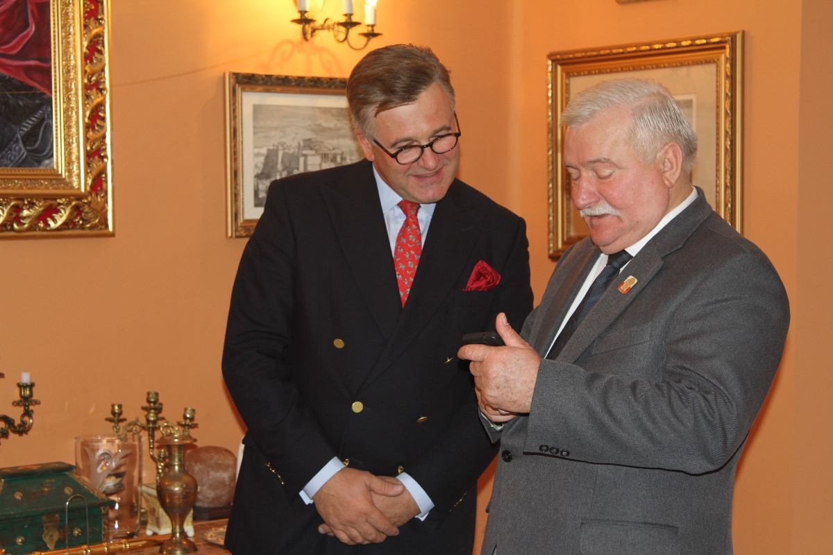 Prezydent RP Lech Wałęsa z Senatorem Jarosławem W. Laseckim